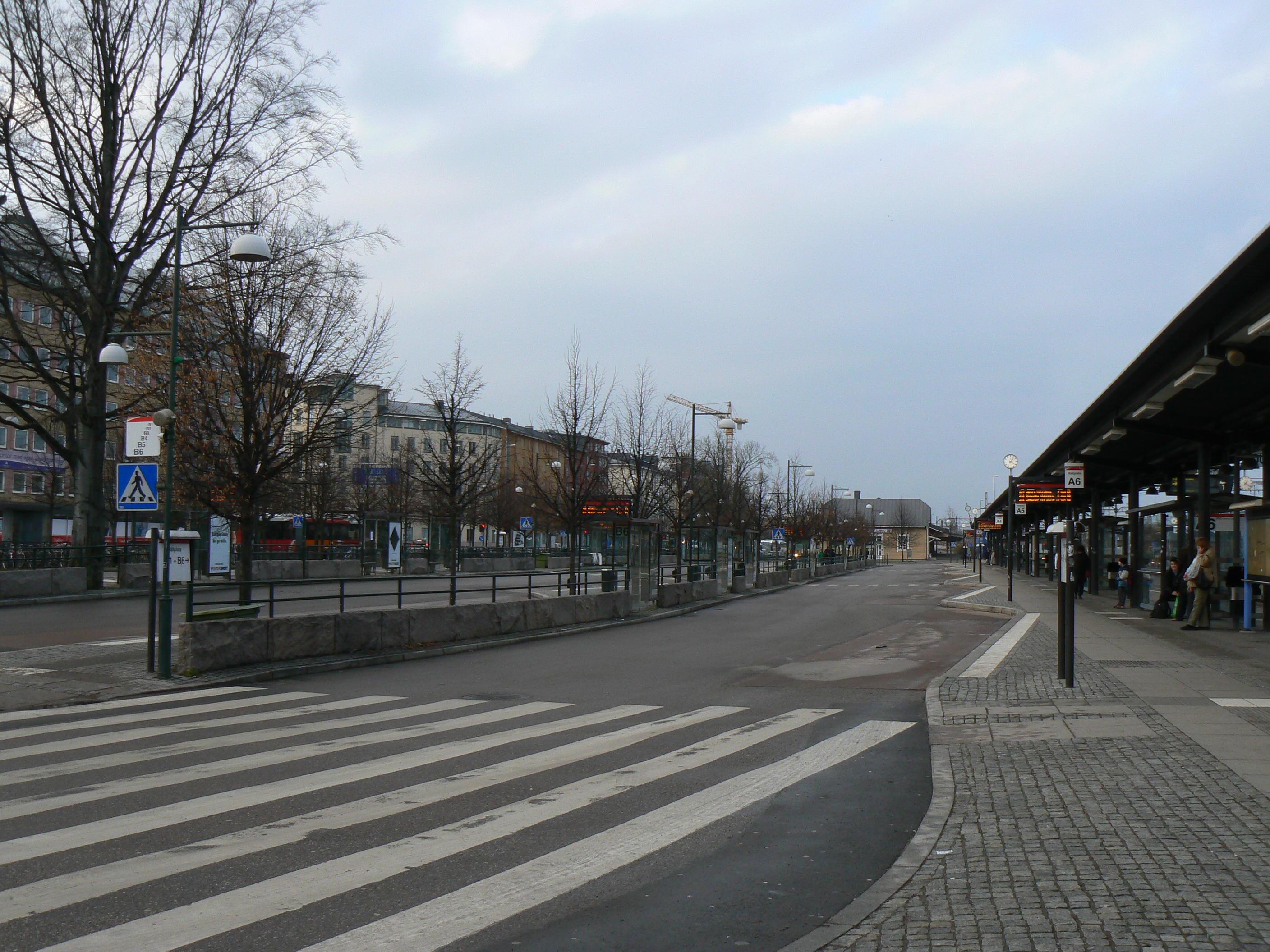 Linköpings resecentrum, busstationen.